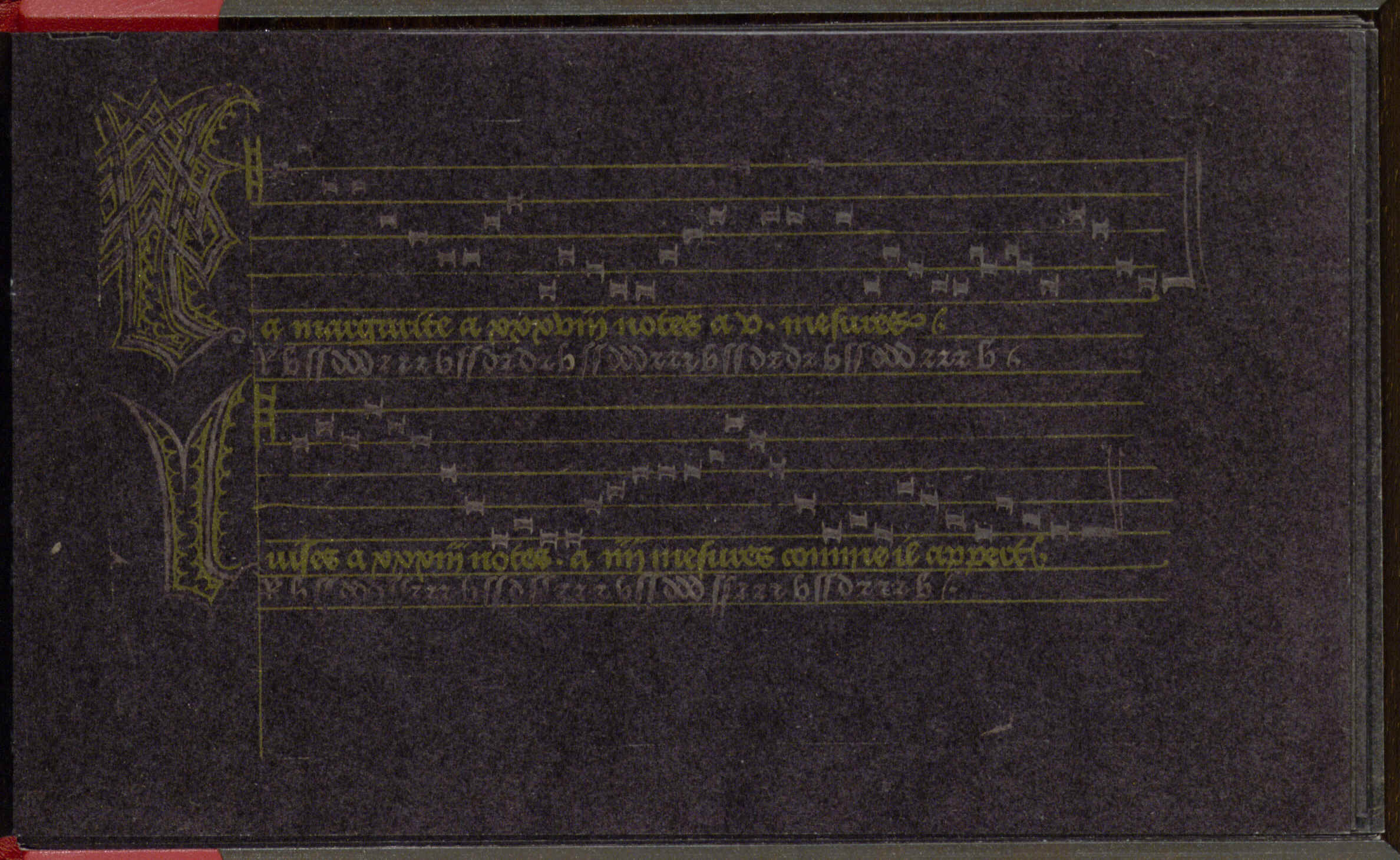 Das Tanzbüchlein der Margarete von Österreich